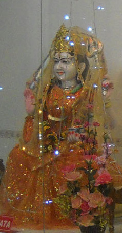 Santoshi Mata